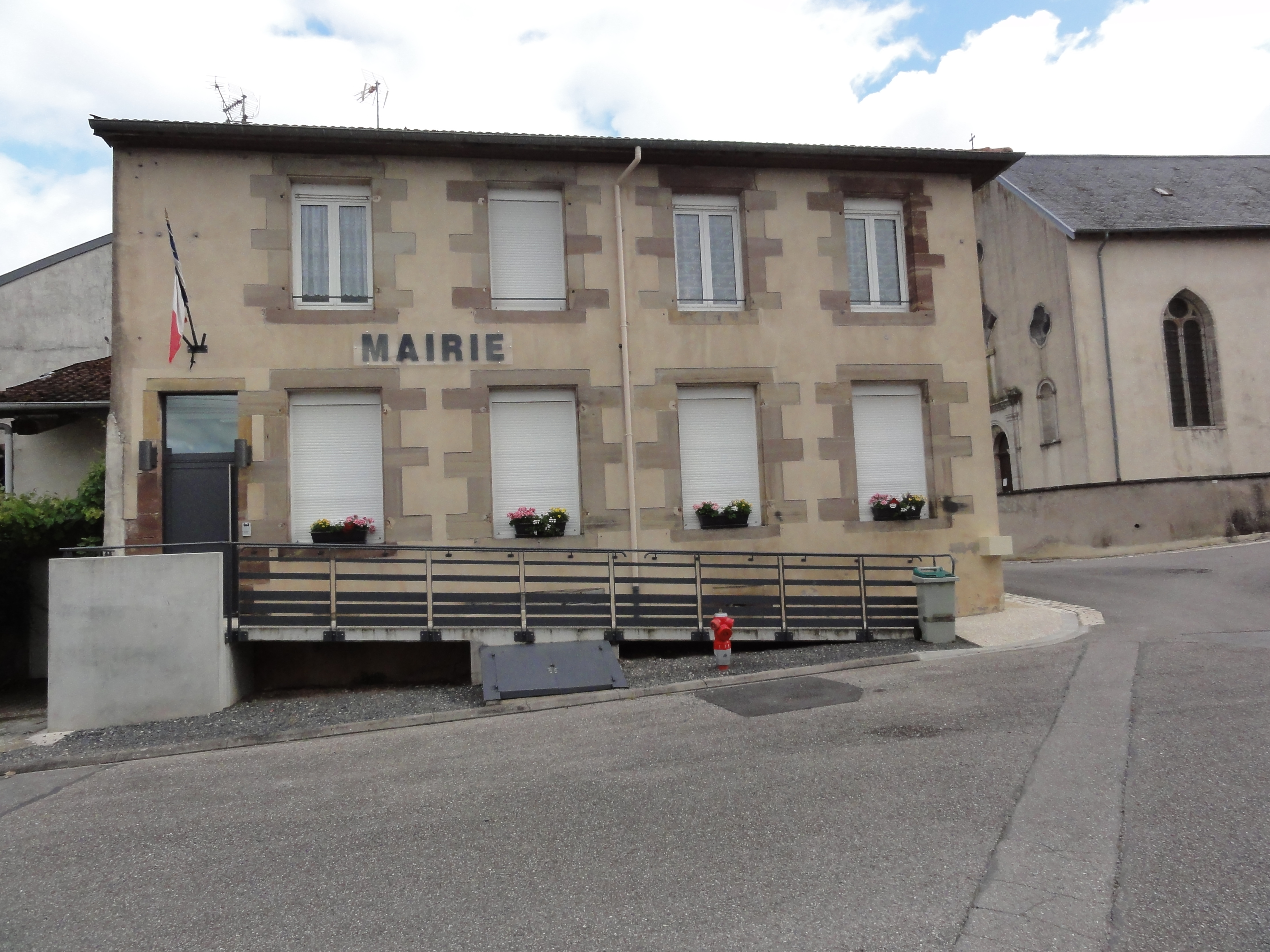 Raville-sur-Sânon (M-et-M) mairie